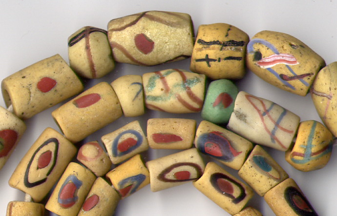 Akoso beads.